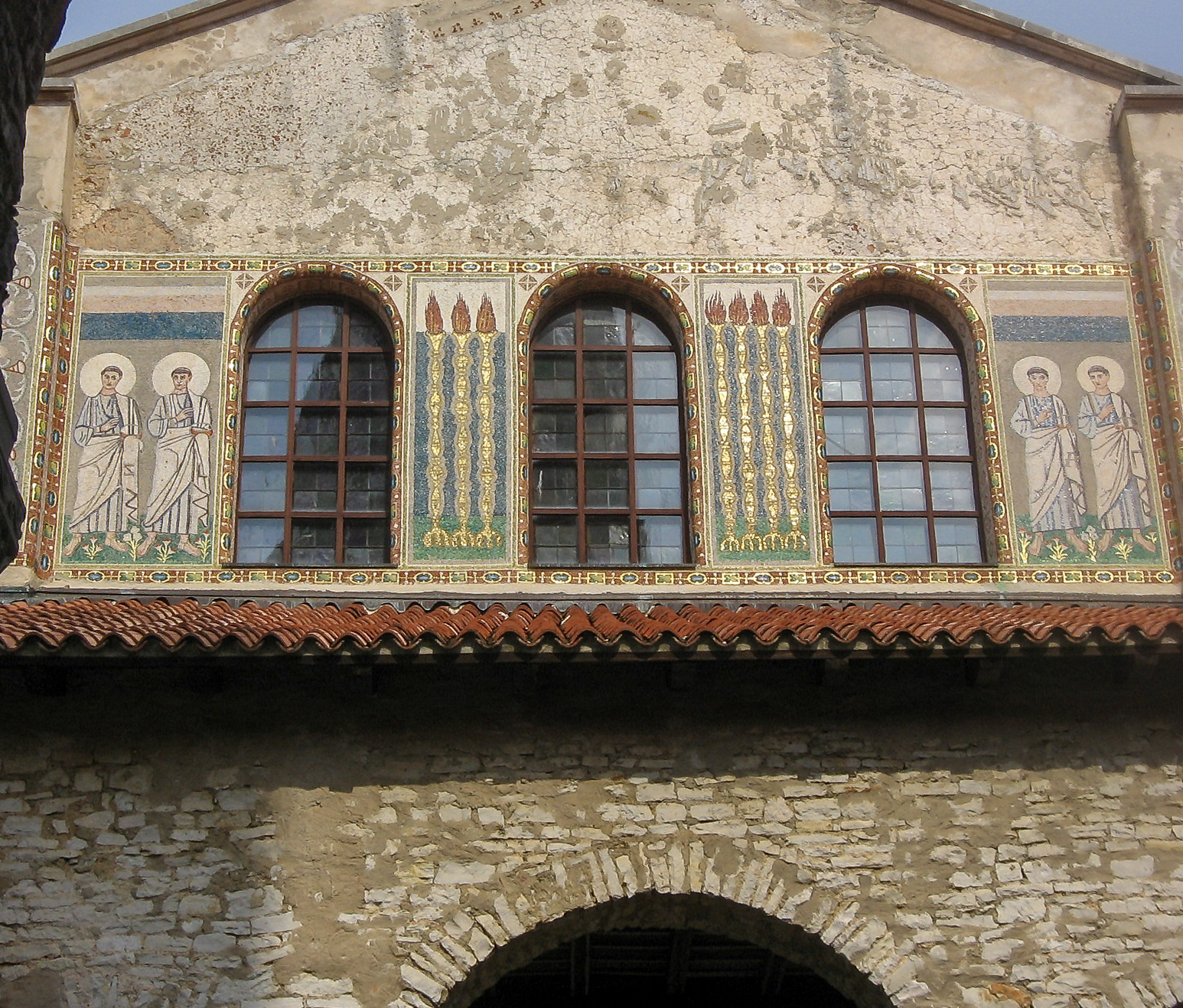 Fenster mit Mosaiken der Westfassade der Euphrasius-Basilika in Poreč.